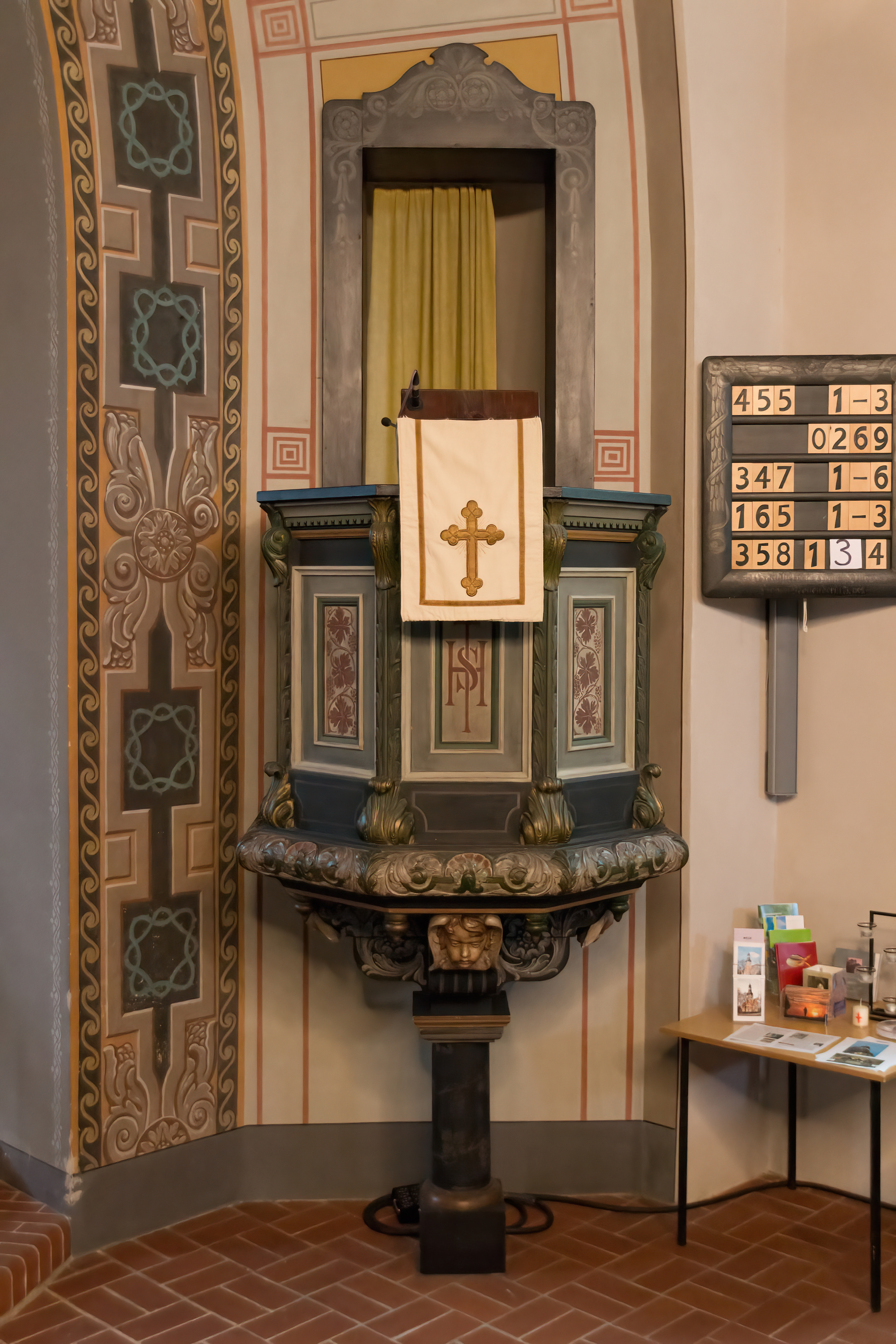 Dorfkirche Hohen Neuendorf Kanzel